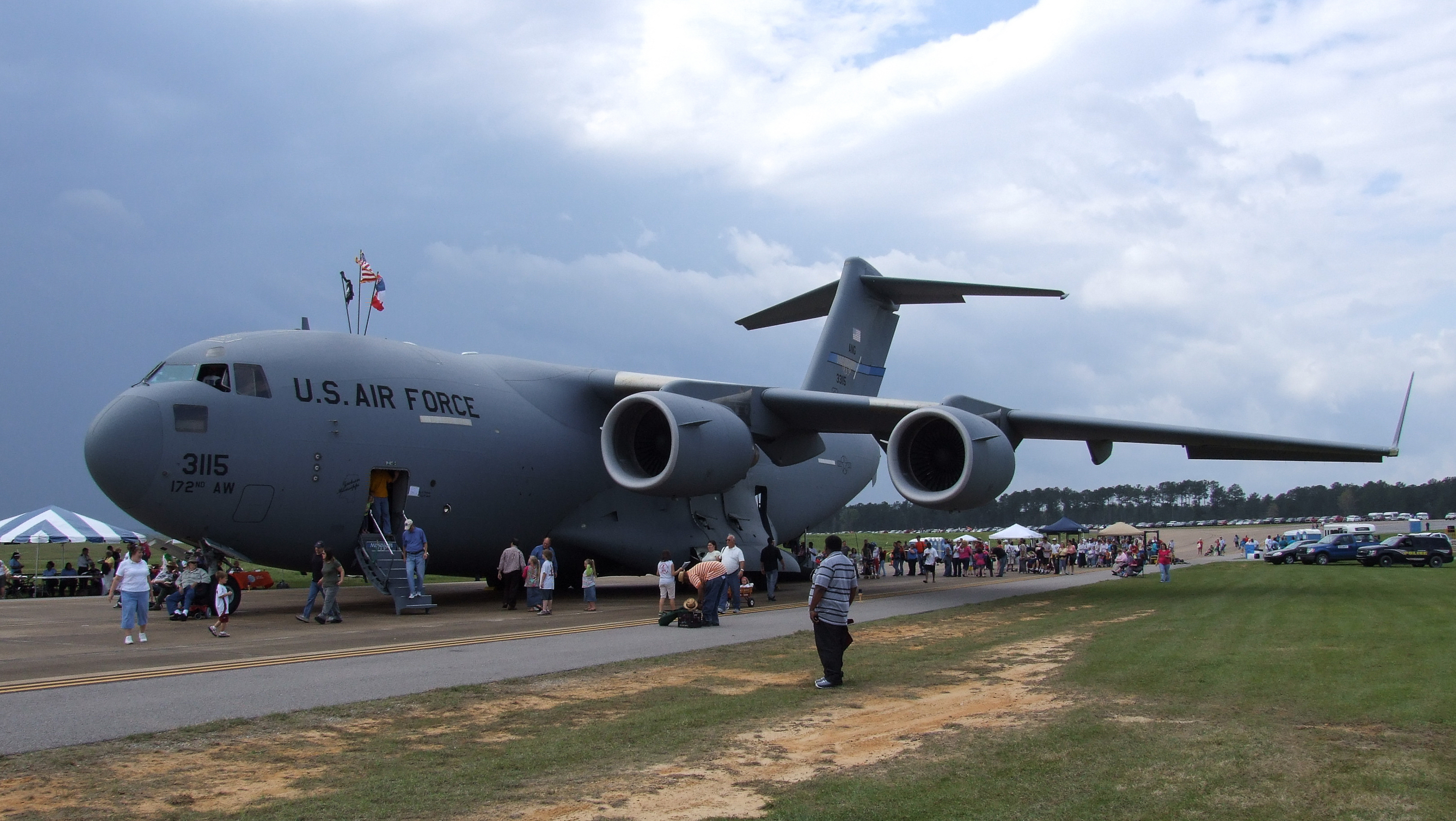 Eine McDonnell Douglas C-17 Globemaster III bei der Meridian Air Show 2011, Mississippi USA